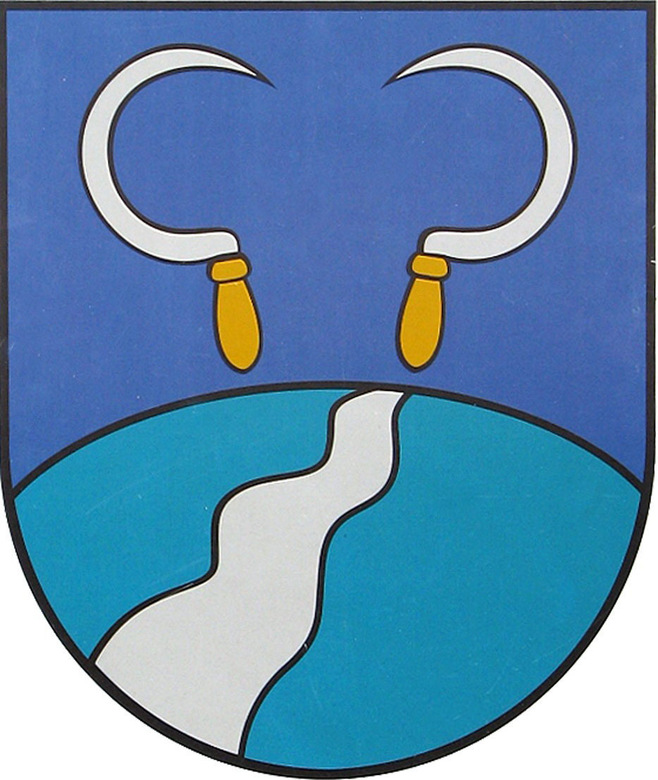 Erb obce Fijaš